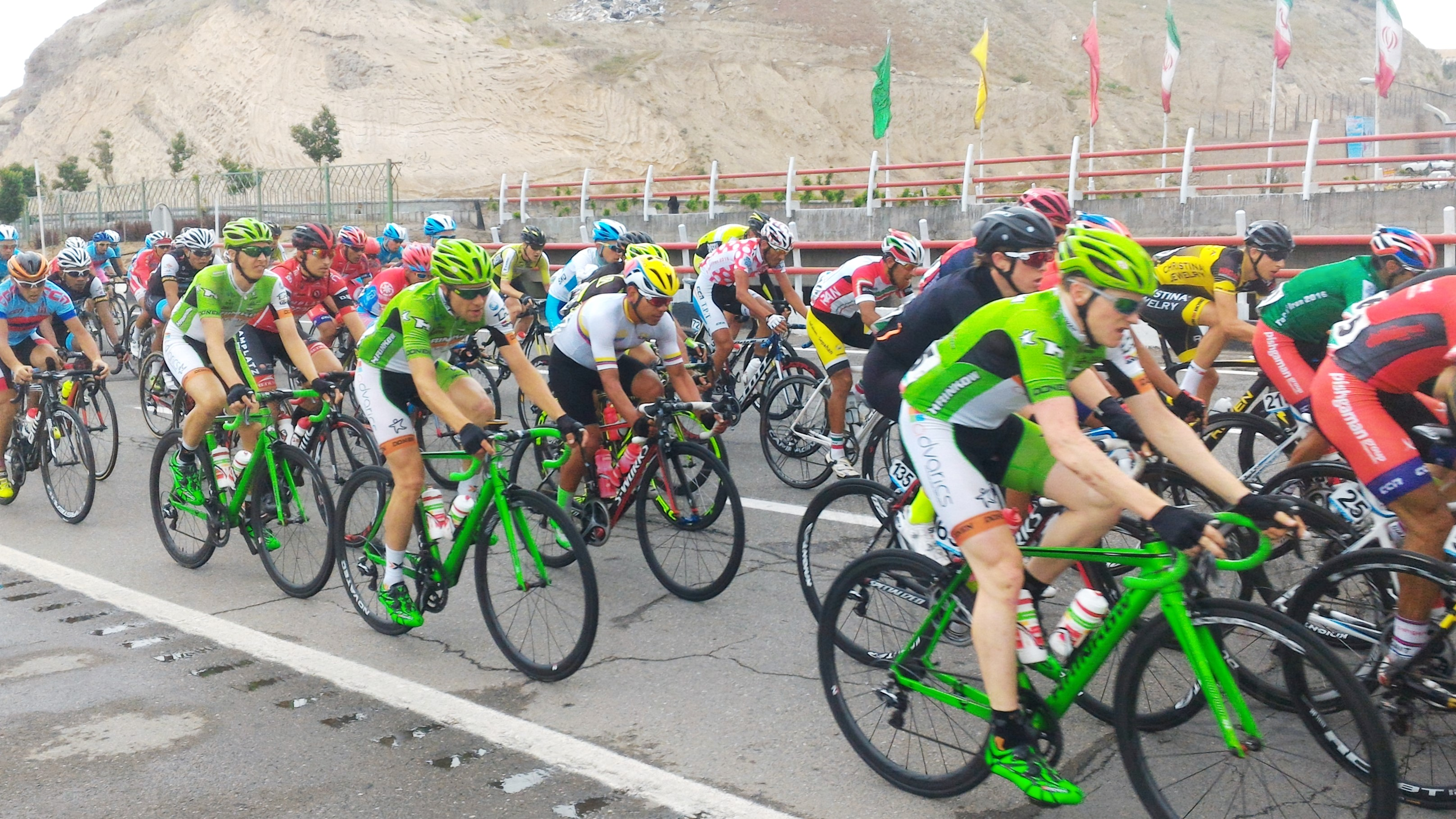 تور بین المللی دوچرخه سواری آذربایجان ایران در سال 1395